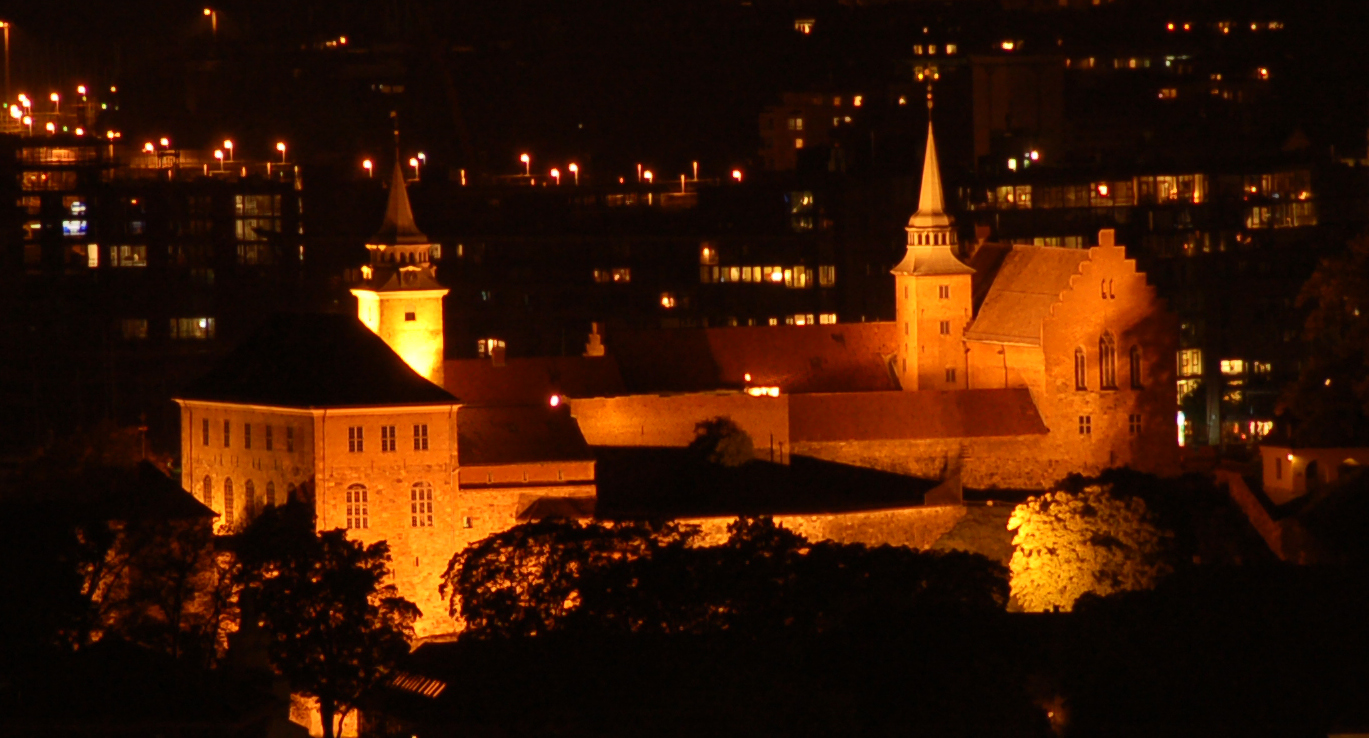 Akershus festning tatt fra utsiktspunktet opp til ekebergsletta ca kl 22. Akershus fortress taken from a well known viewpoint of Oslo around 10pm.